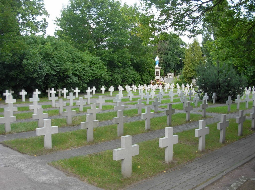 Cmentarz Nowofarny Bydgoszcz, kwatera żołnierzy poległych w wojnie 1920 i 1945 r.